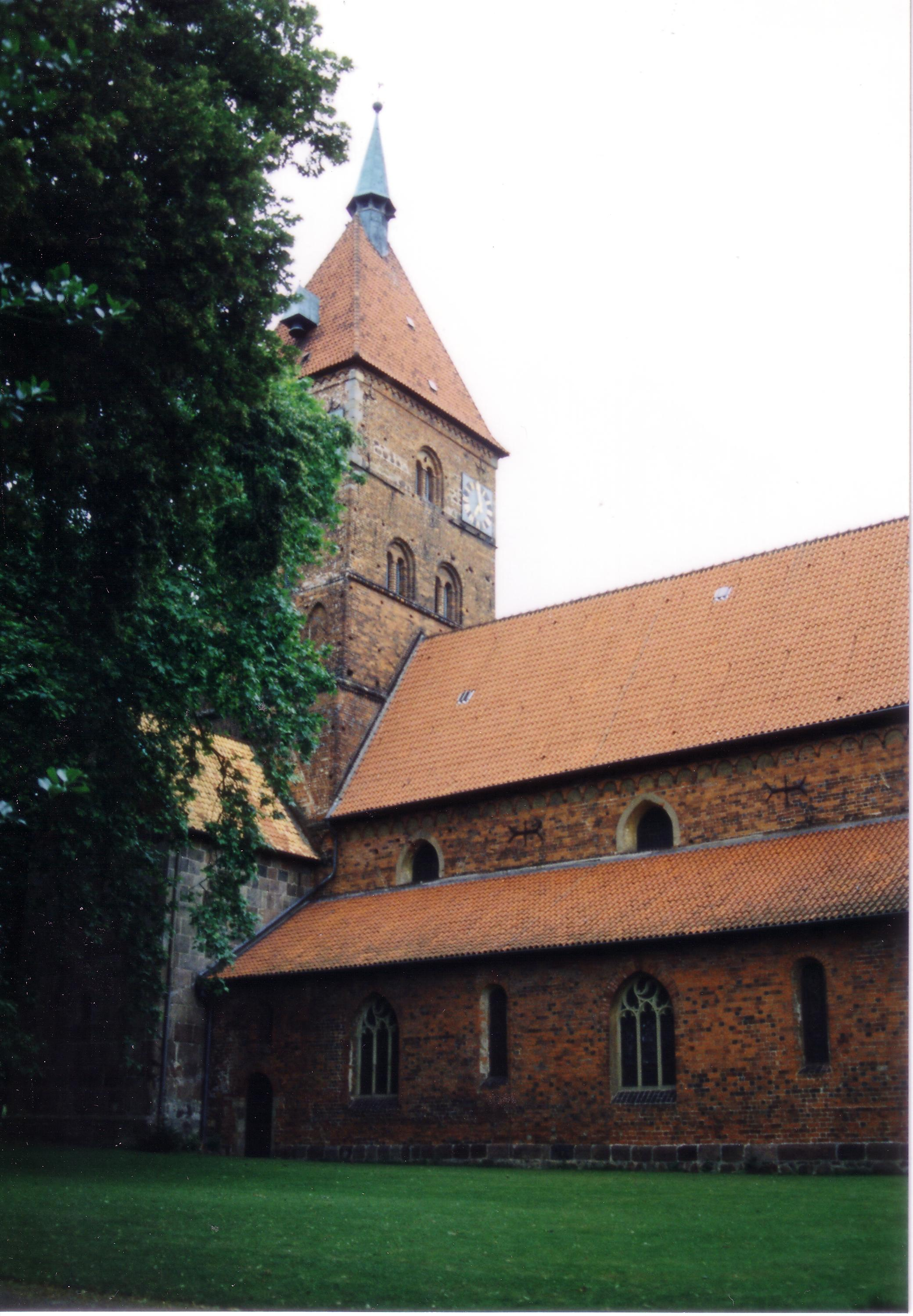 Alexanderkirche Wildehausen